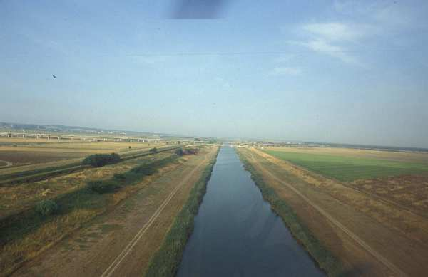 Il canale nei pressi di Mortaiolo.